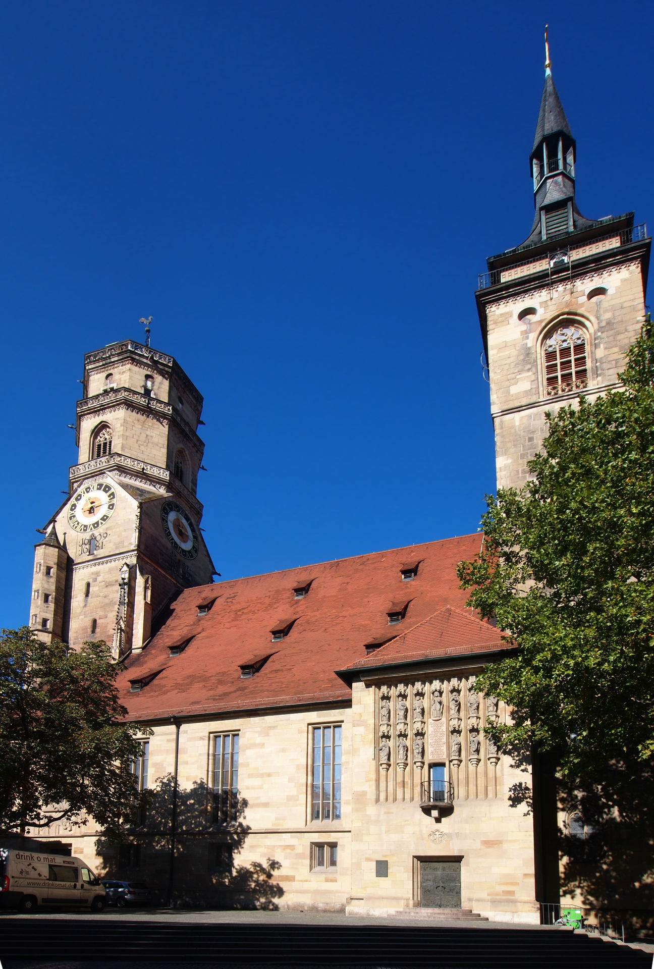 Stiftskirche Stuttgart, von der Kirchstraße, mit dem Aposteltor